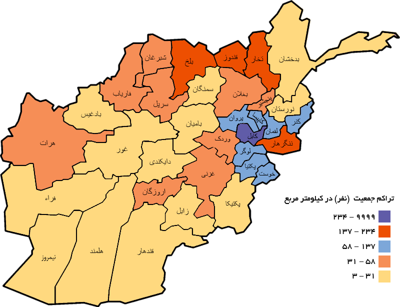 براورد تراکم جمعیت افغانستان در کیلومتر مربع